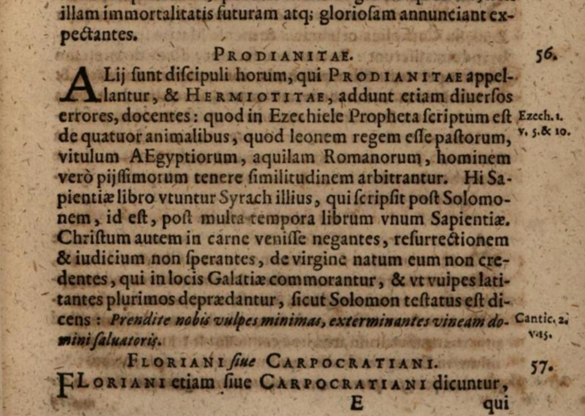 Филастрий в книге «Liber de Haeresibus» — «Книга ересей» о проклианитах. Издание 1614 года